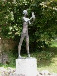 Sculpture